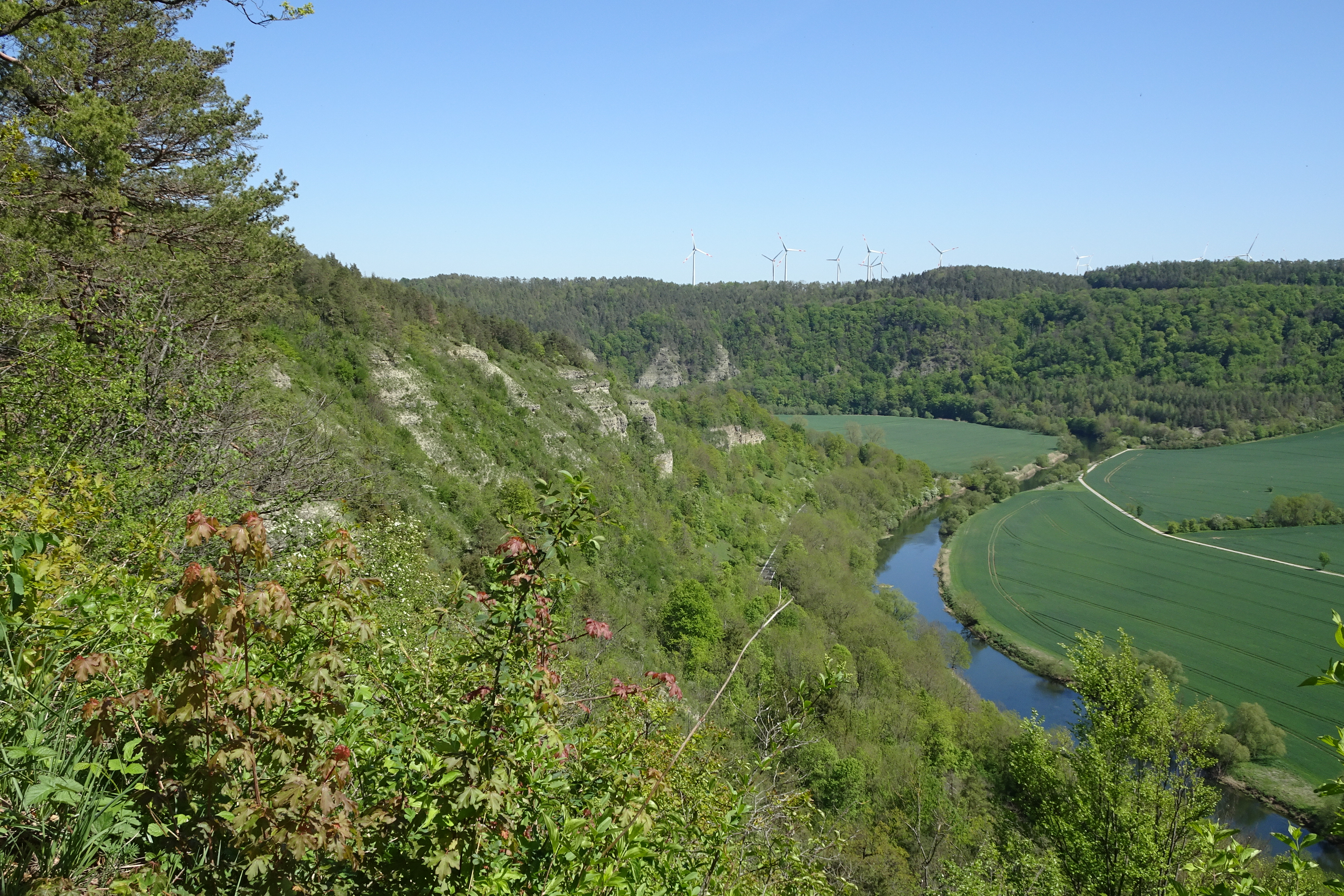 Die Ebenauer Köpfe gehören zum Naturschutzgebiet „Ebenauer Köpfe und Wisch“ und zum Flora-Fauna-Habitat-Gebiet „Creuzburger Werratal-Hänge“ im westthüringischen Wartburgkreis. Das Naturschutzgebiet hat die thüringeninterne Kennung 64 und den WDPA-Code 162830. Das FFH-Gebiet hat in Thüringen die Nummer 35, die europäische Gebietsnummer 4927-303 und den WDPA-Code 555520295.